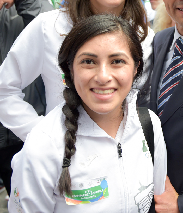 El Presidente Enrique Peña Nieto se reunió hoy con los deportistas que integraron la delegación mexicana que participó en los Juegos Olímpicos de Río de Janeiro 2016, a quienes les expresó su reconocimiento por el esfuerzo, la entrega, el empeño y el coraje que demostraron en esta justa olímpica y durante el proceso para llegar a ella.